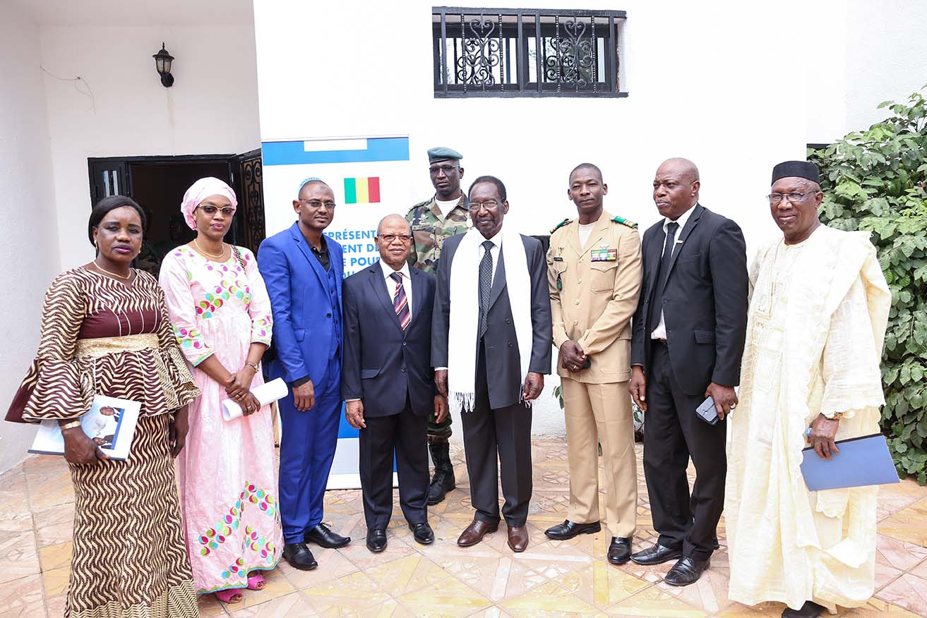 Dioncounda Traoré et son staff au Mali, le 23 janvier 2020. (VOA/Kassim Traoré)